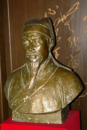 Image:Wentianxiang touxiang.jpg 文天祥头像 拍摄